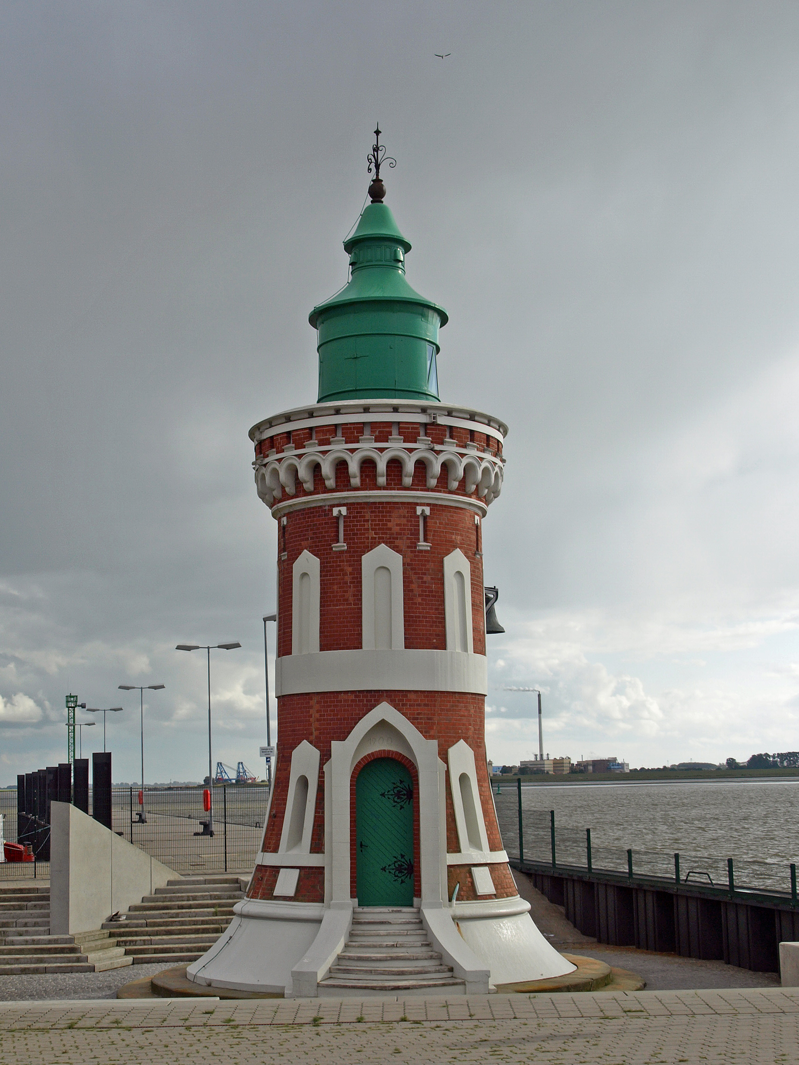 Leuchtturm Kaiserschleuse in Bremerhaven in Betrieb seit 1900